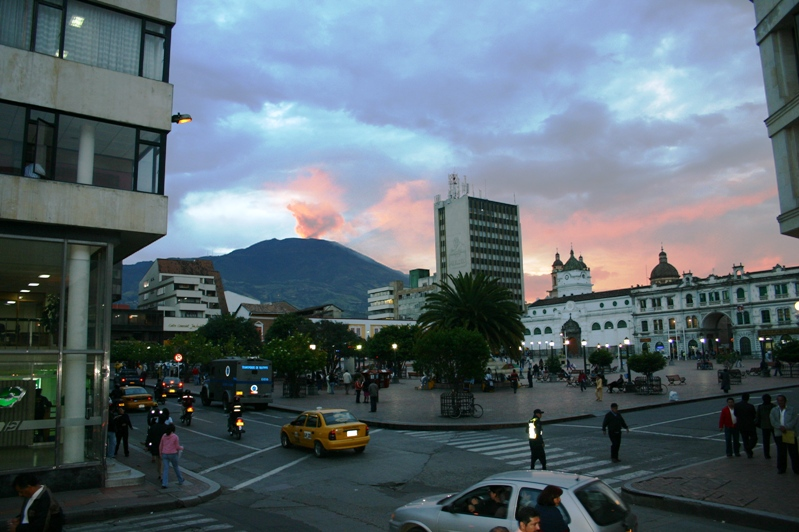 Atardecer-Parque Nariño, plaza principal - San Juan de Pasto. (Al fondo, Volcan Galeras)